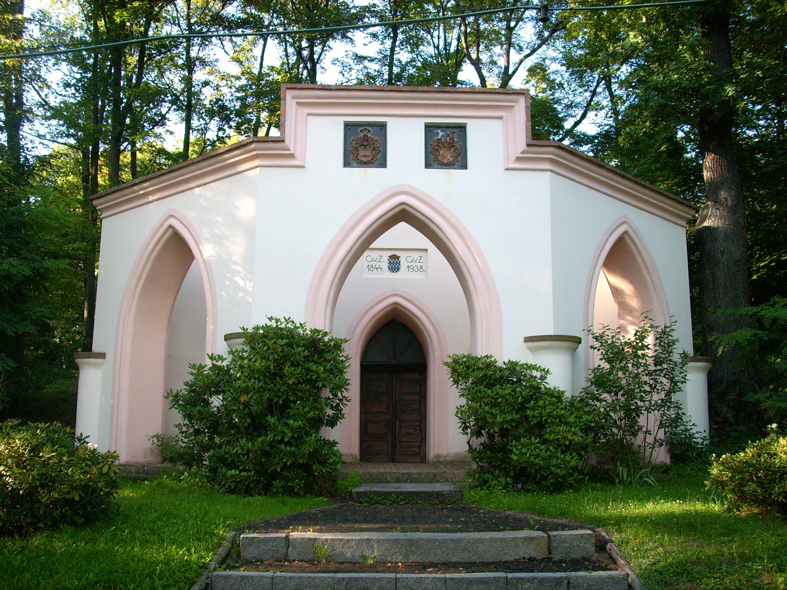 Gruft der Adelsfamilie von Zehmen, Kulturdenkmal in Weißig, Ortsteil von Oßling